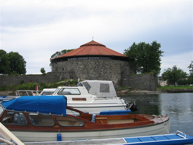 Christiansholm festning, Kristiansand, Norge.